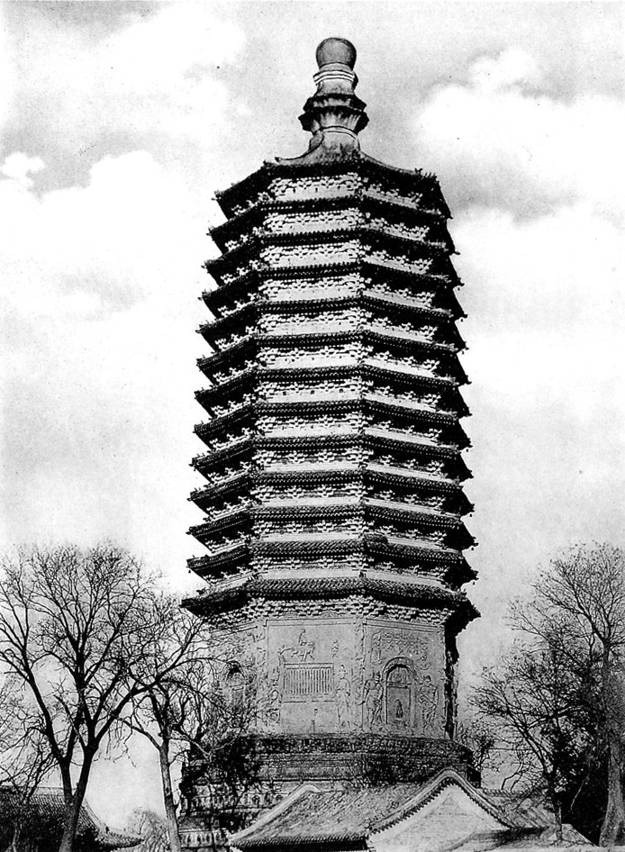 photo from Ein Tagebuch in Bildern